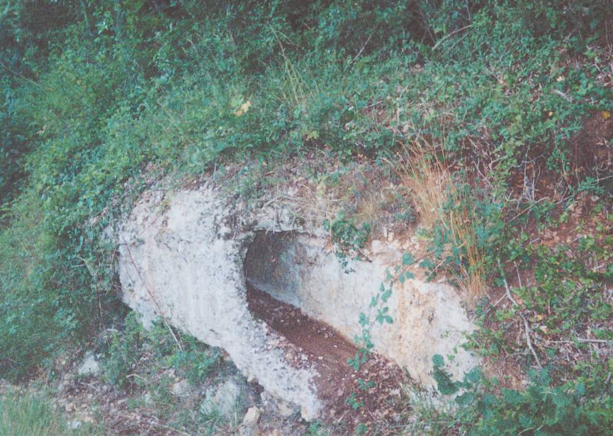 * Date : 10 août 2004, vers 15 h 50 Source : photo personnelle d'archeos Description : Aqueduc souterrain romain de Basse-Fontaine, sur la commune de Ligugé Licence